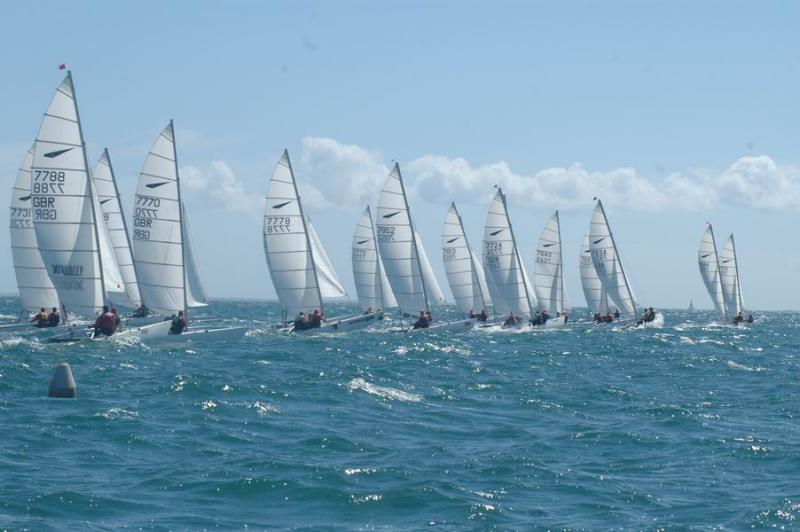 eigen plaatje